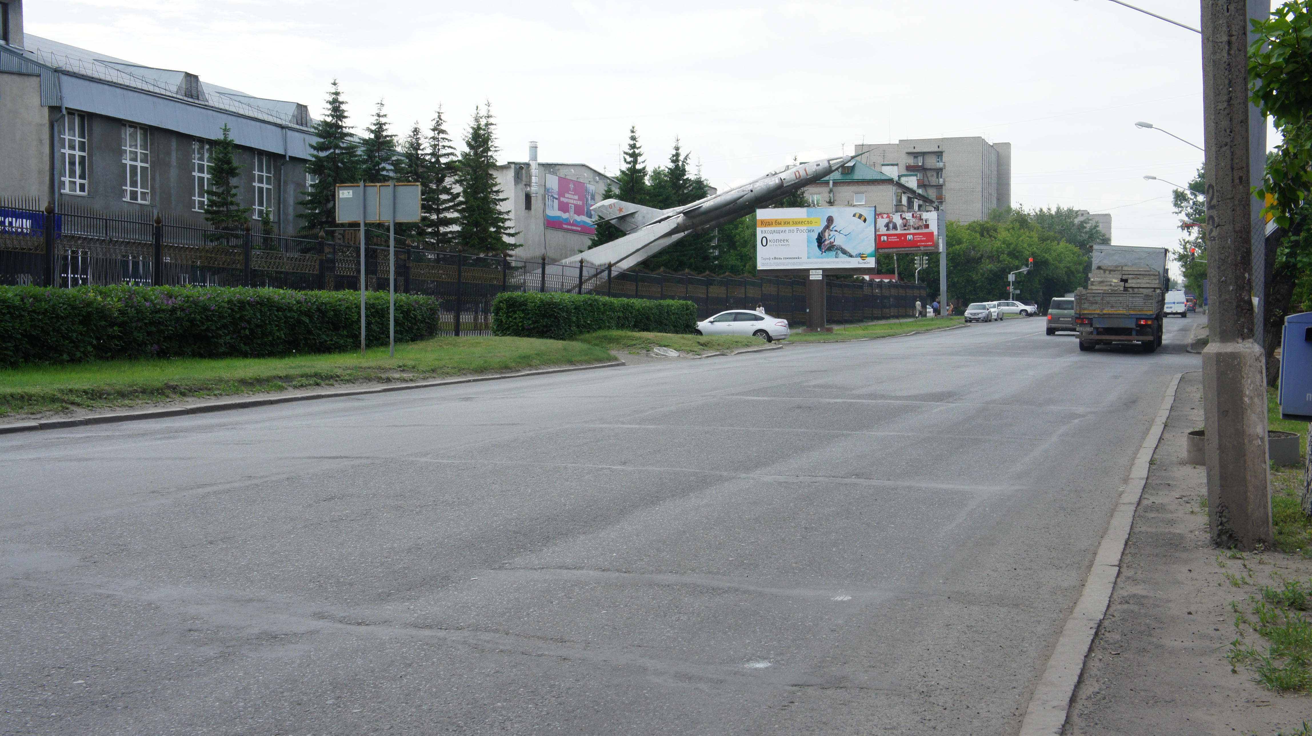 Комсомольский проспект, Барнаул. Вид на корпуса Юридического института (ранее здесь располагалось Лётное училище)